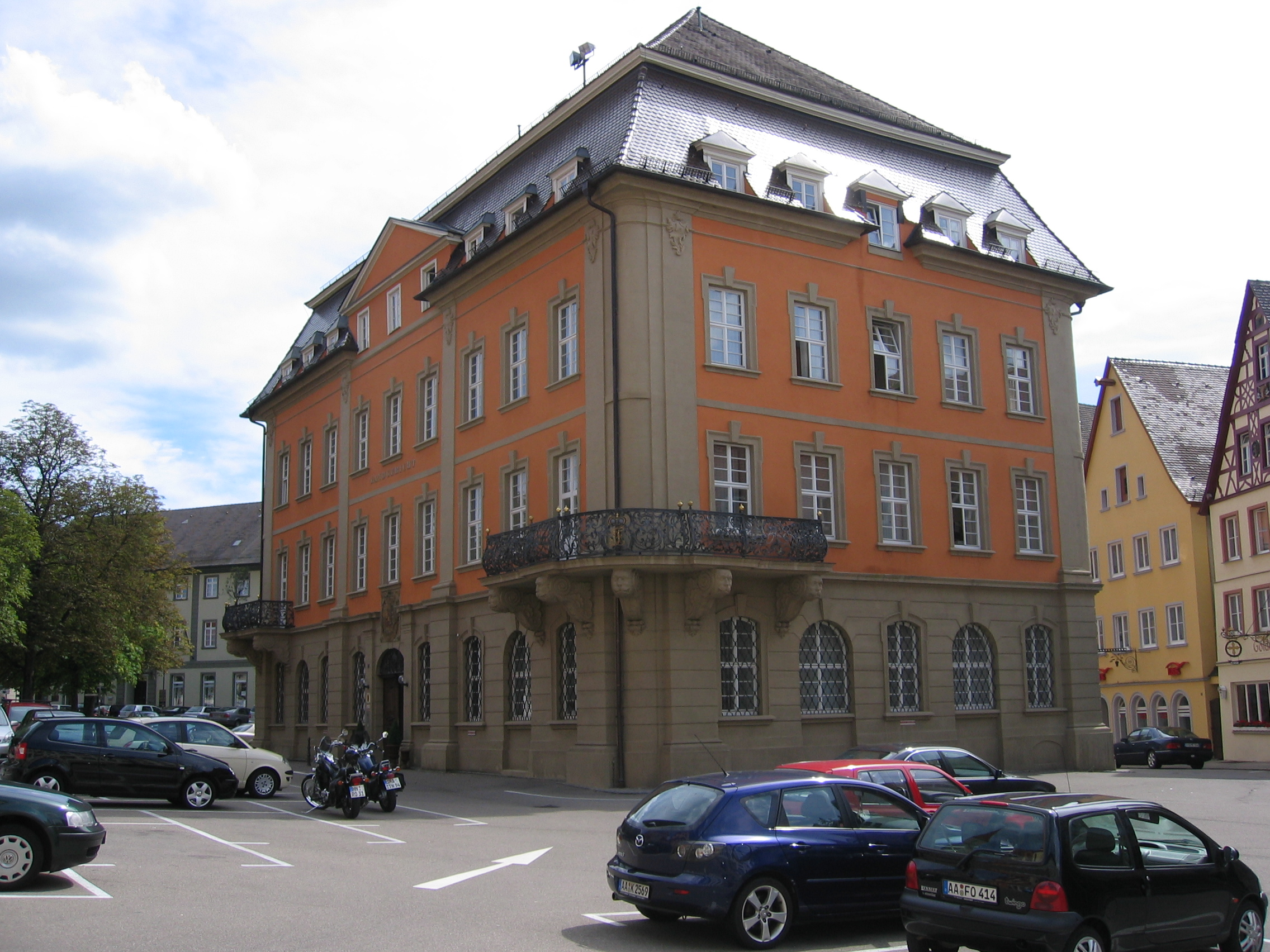 Landgerichtsgebäude in Ellwangen